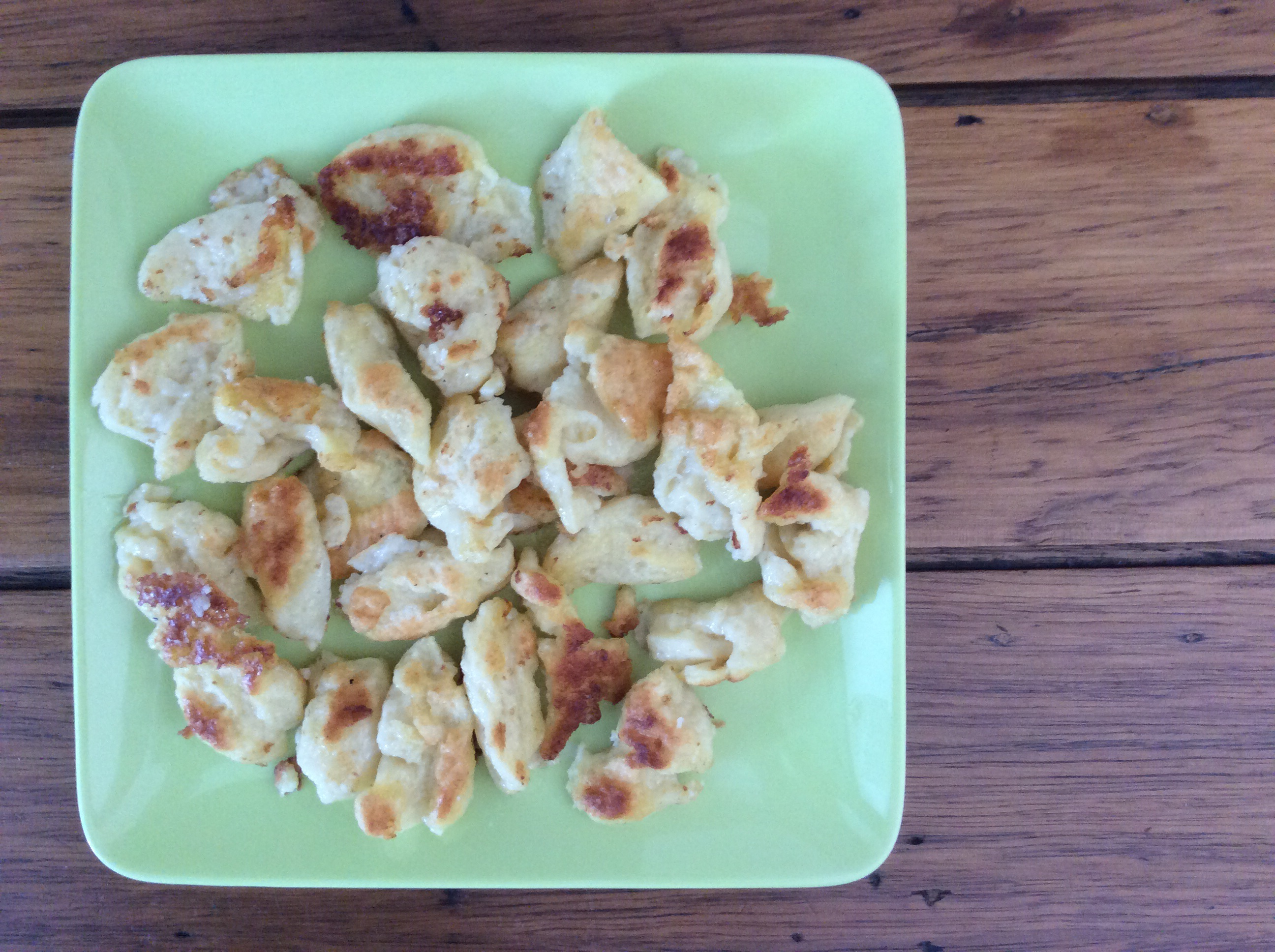 Kneff vosgiennes dorées au beurre avant le service